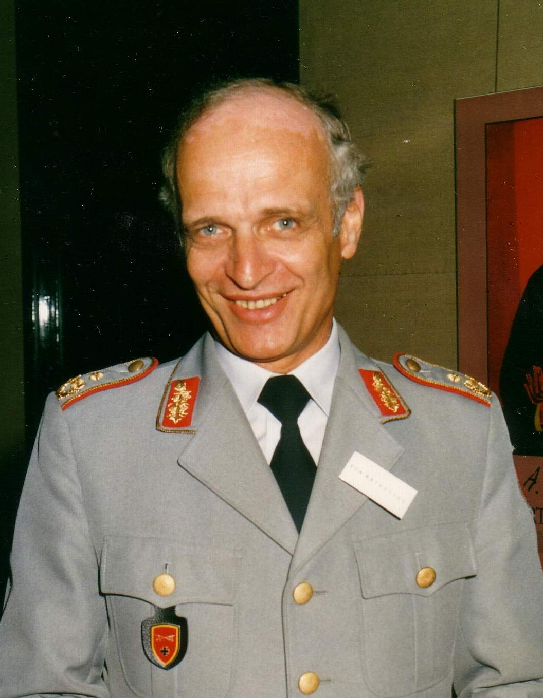 Stellv Amtschef und Stabschef des Heeresamtes, Köln, Mark Heinrich von Nathusius, 1988